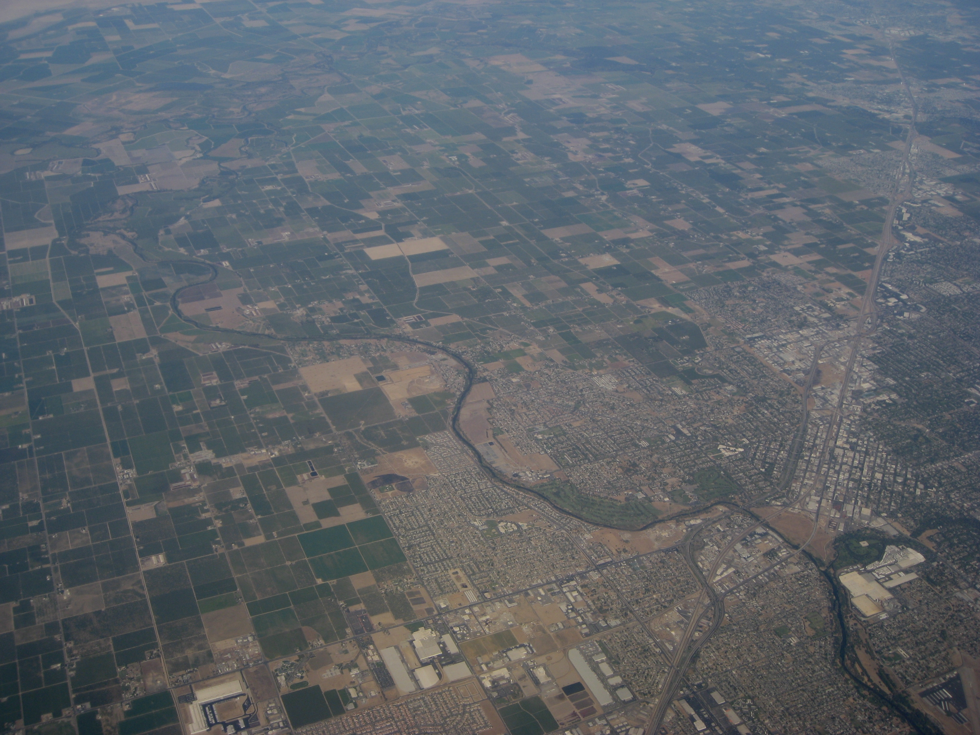 i090909 640